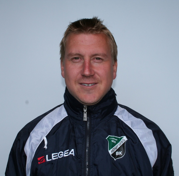 Leif Gunnar Smerud, norsk fotballspiller som spiller for Hønefoss Ballklubb.